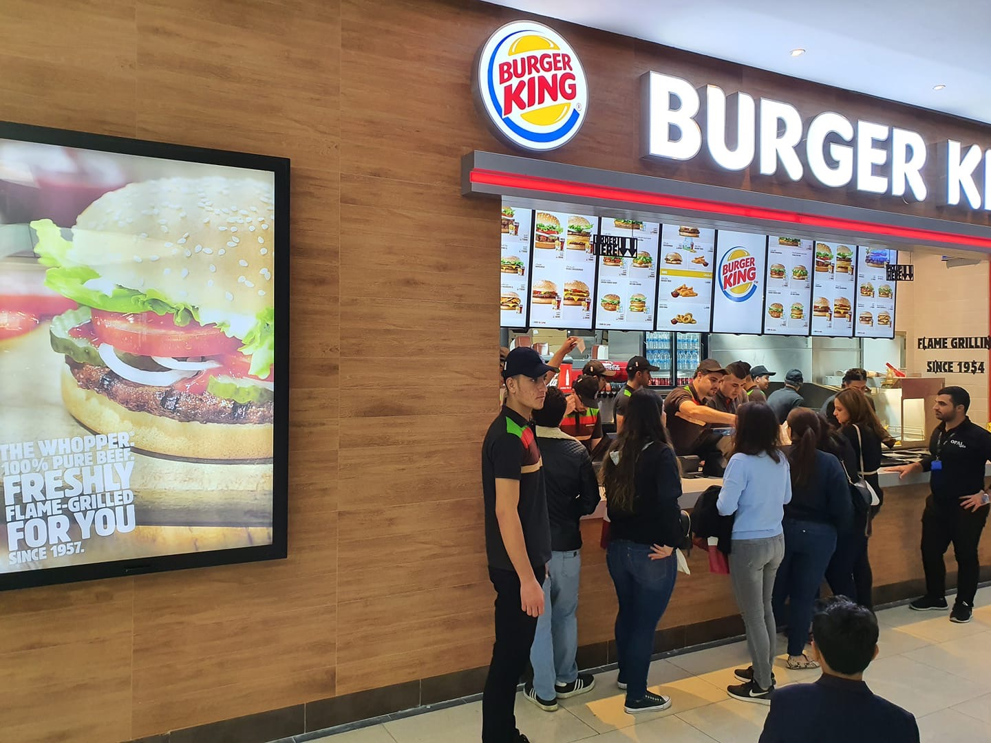 کوردی: کۆمەڵە کڕیاڕێک لە پێش خواردنگەی بەرگەر کینگ